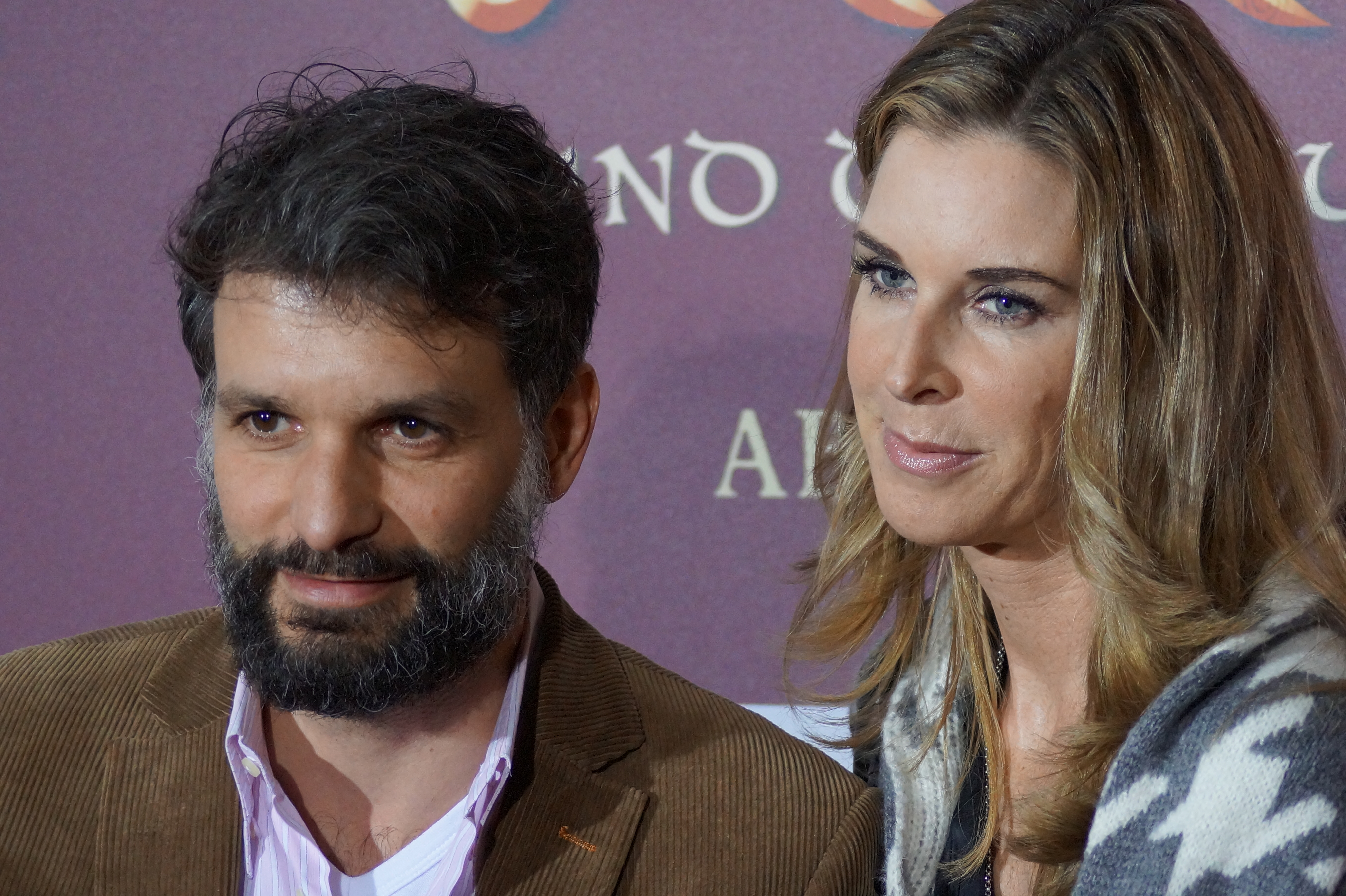 Luca Zamperoni und seine Ehefrau Simone Höller bei der Deutschlandpremiere von "Mara und der Feuerbringer", am 29. März 2015, im Cinedom Köln